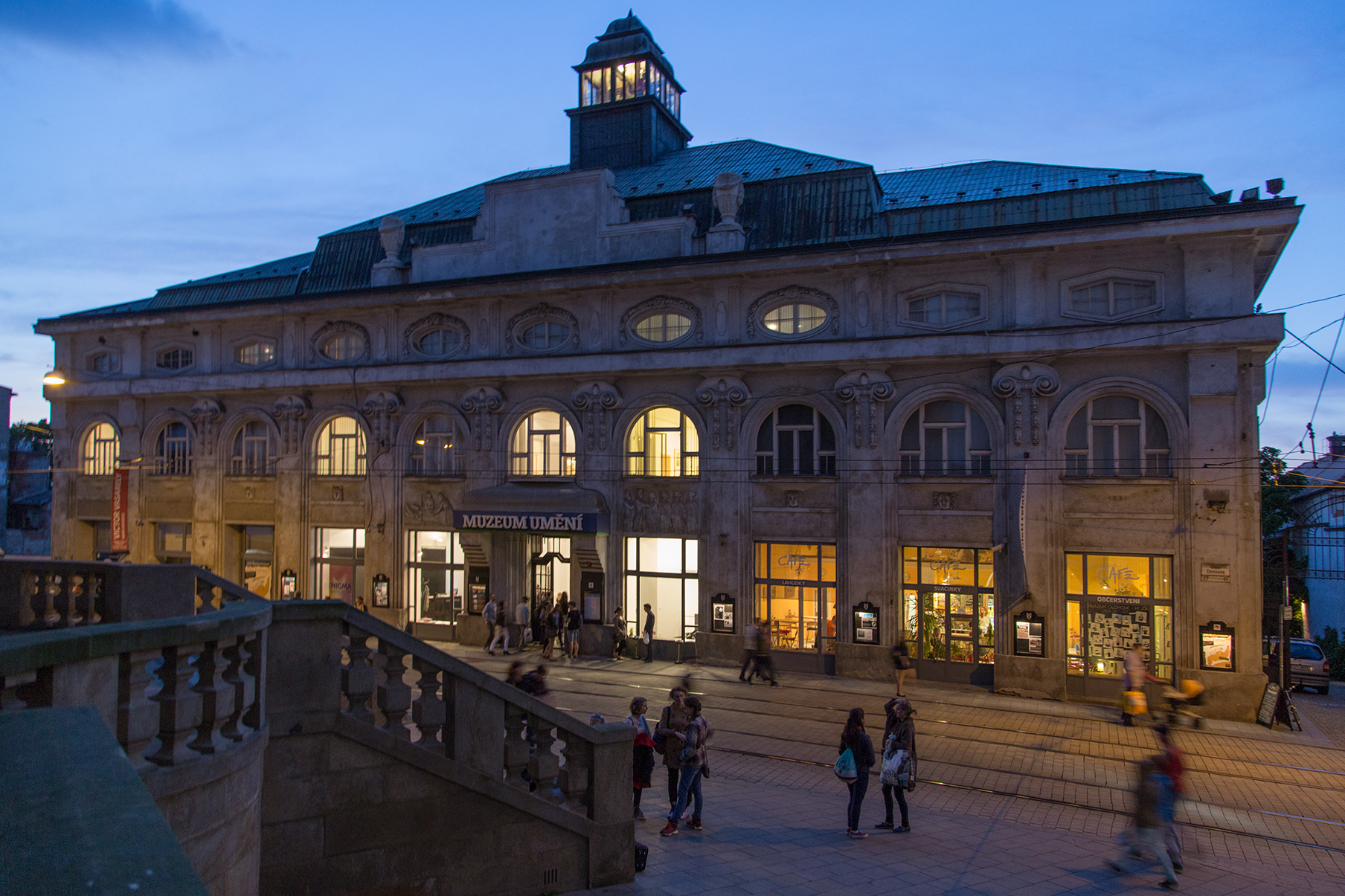 foto: Zdeněk Sodoma/MUO